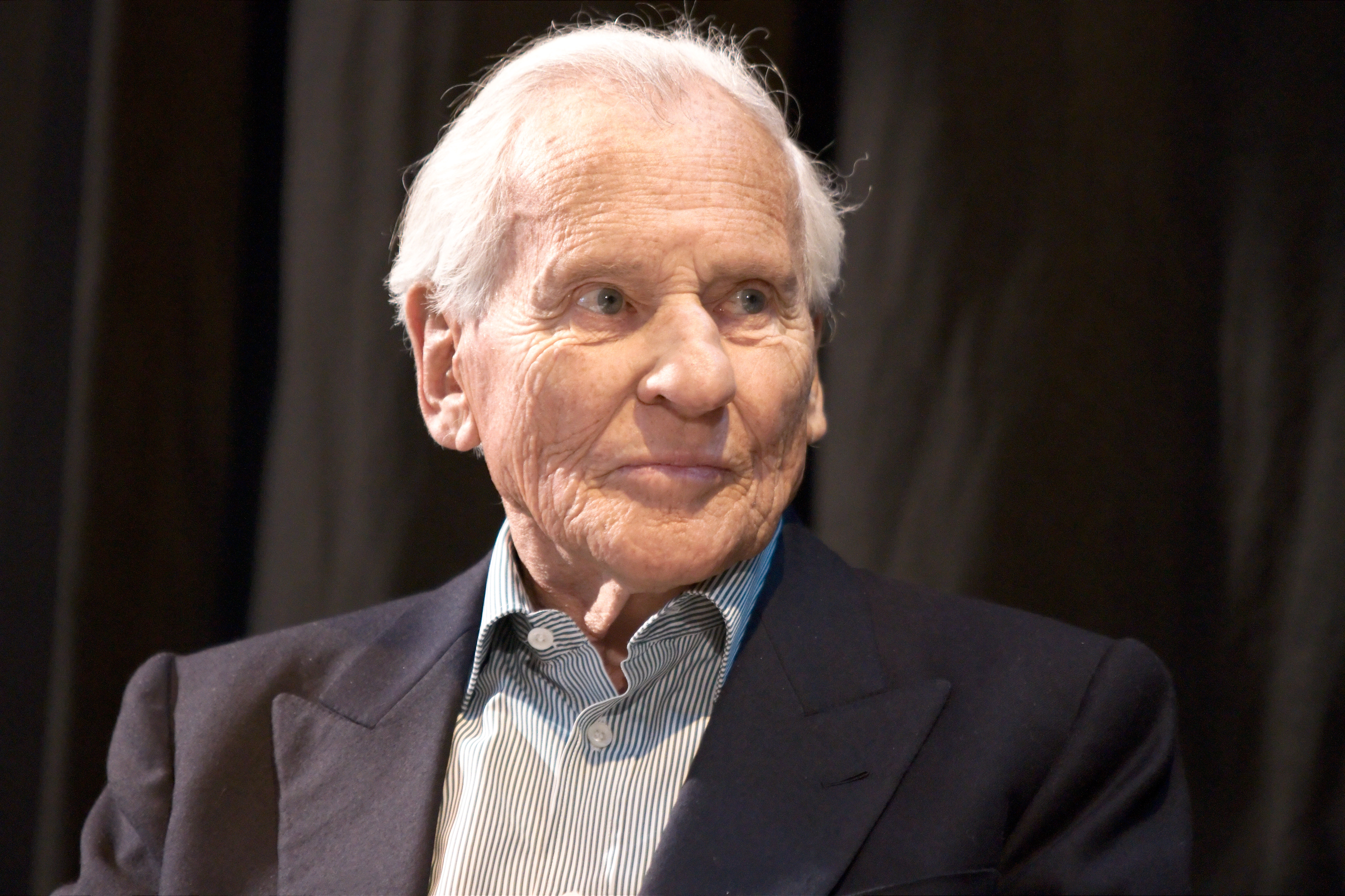 Jean d'Ormesson au Salon du livre de Paris lors d'un tête-à-tête avec António Lobo Antunes.